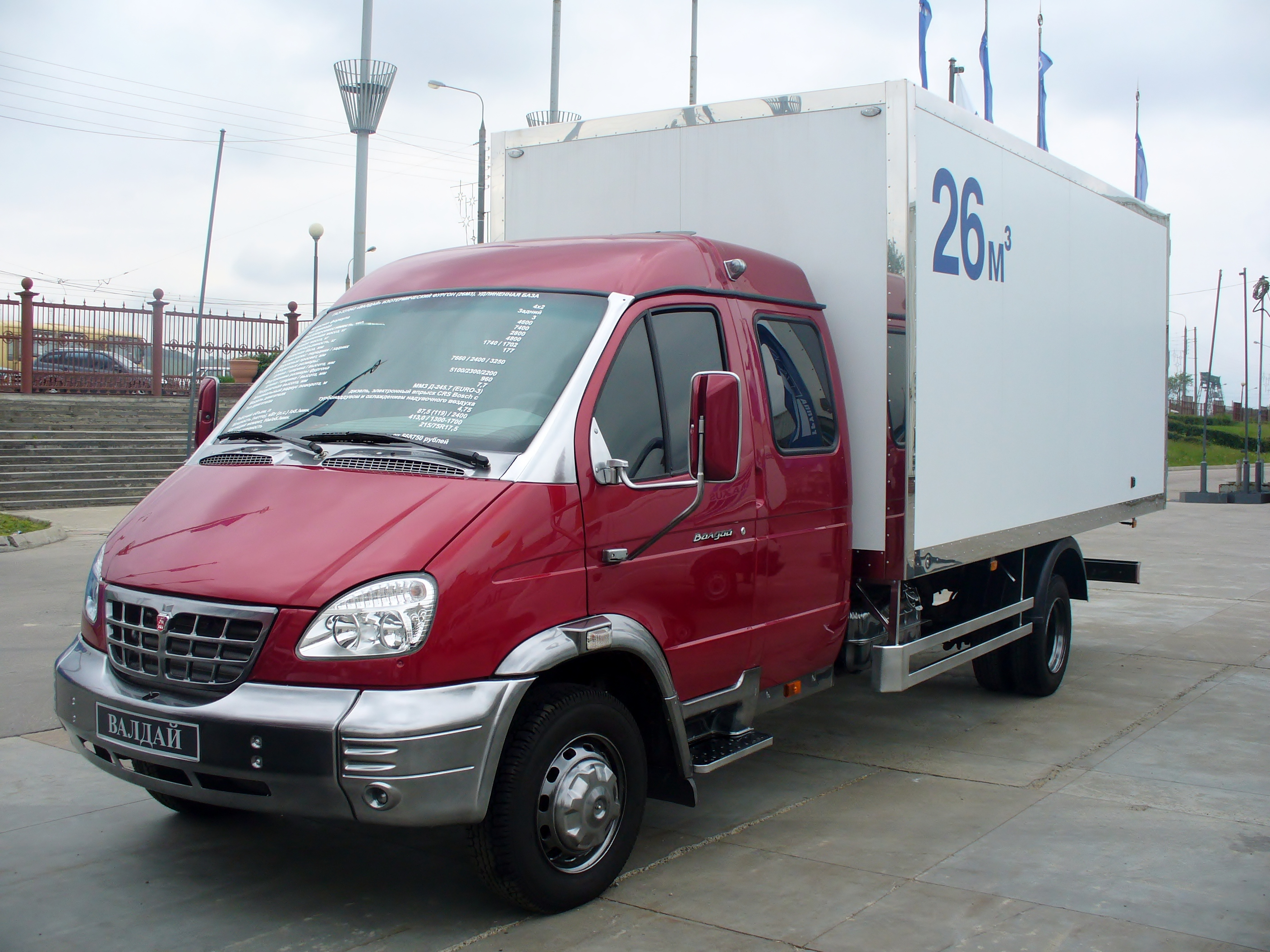 GAZ-331043